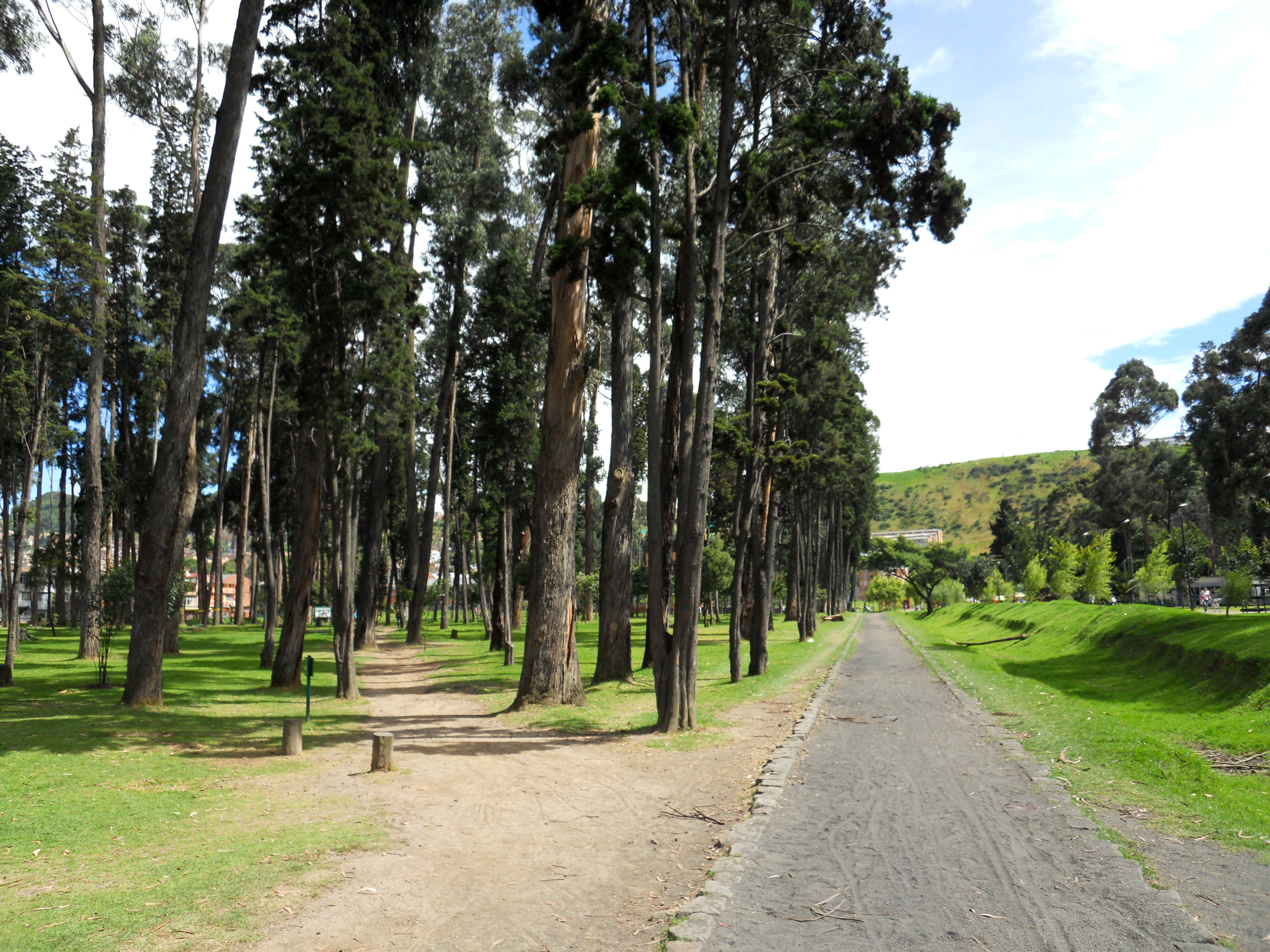 Bosque San Carlos en Bogotá.